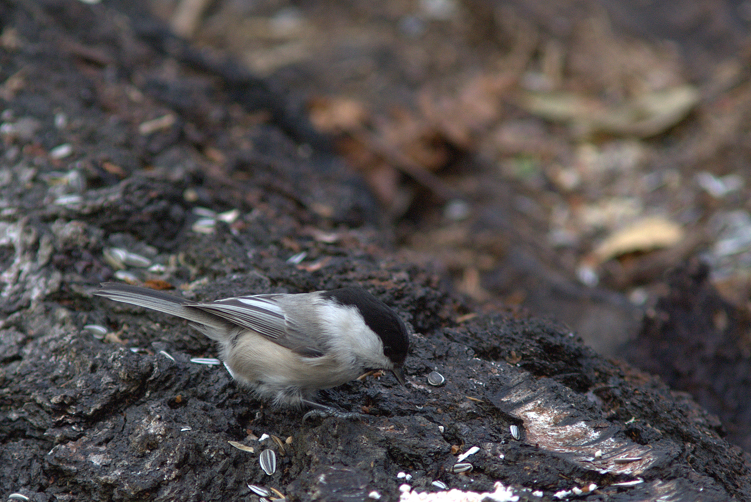 Hömötiainen / Willow Tit Poecile montanus, Kotka, Finland